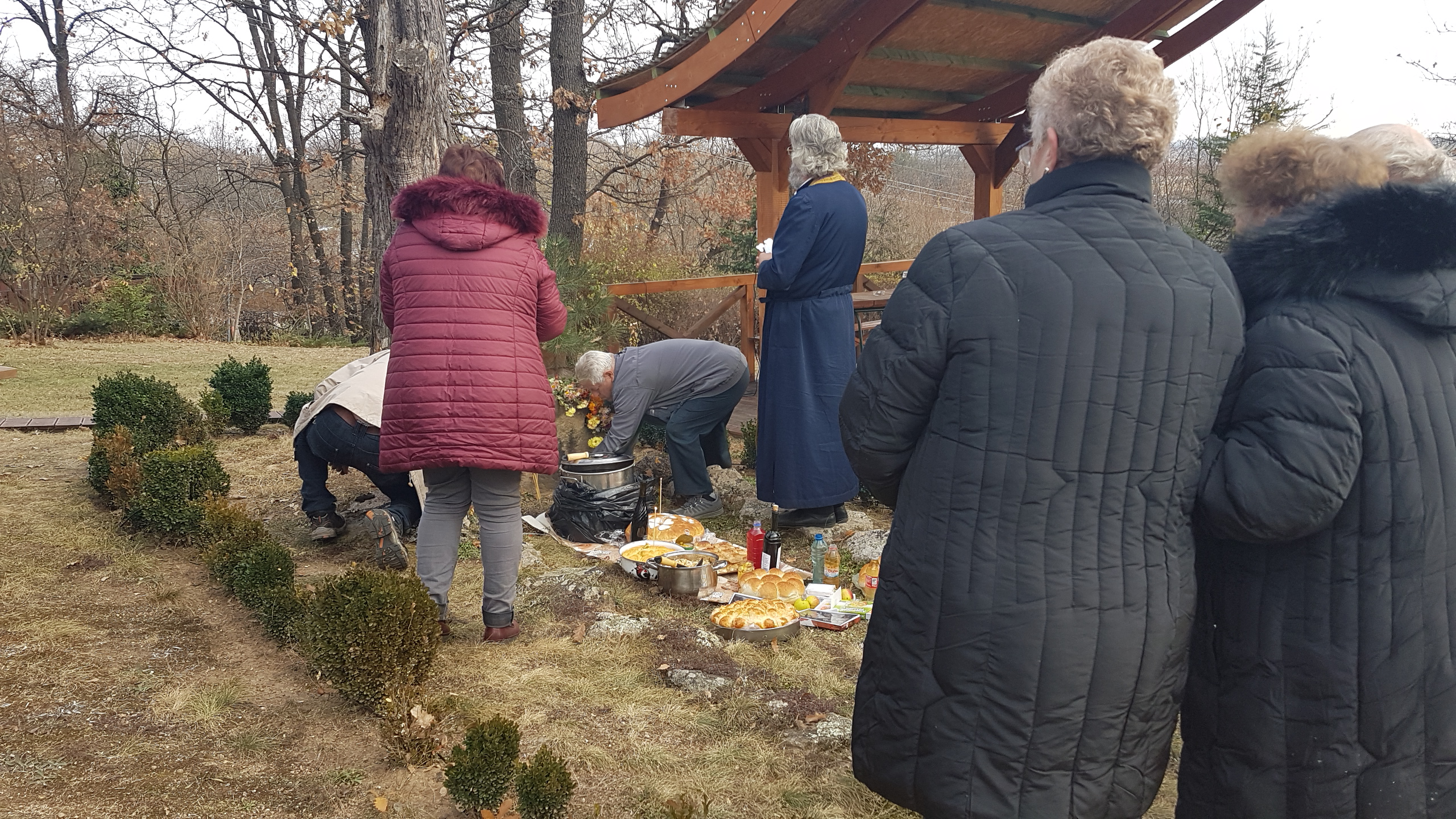 Водосвет на оброк на свети архангел Михаил в село Дръмша